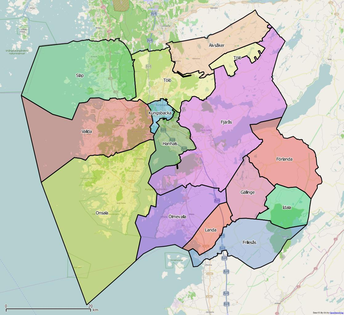 Distriktsindelningen i Kungsbacka kommun World file: 72.98635154248070478 0 0 -72.98635154248070478 1306234.43709867377765477 7885528.00628777593374252